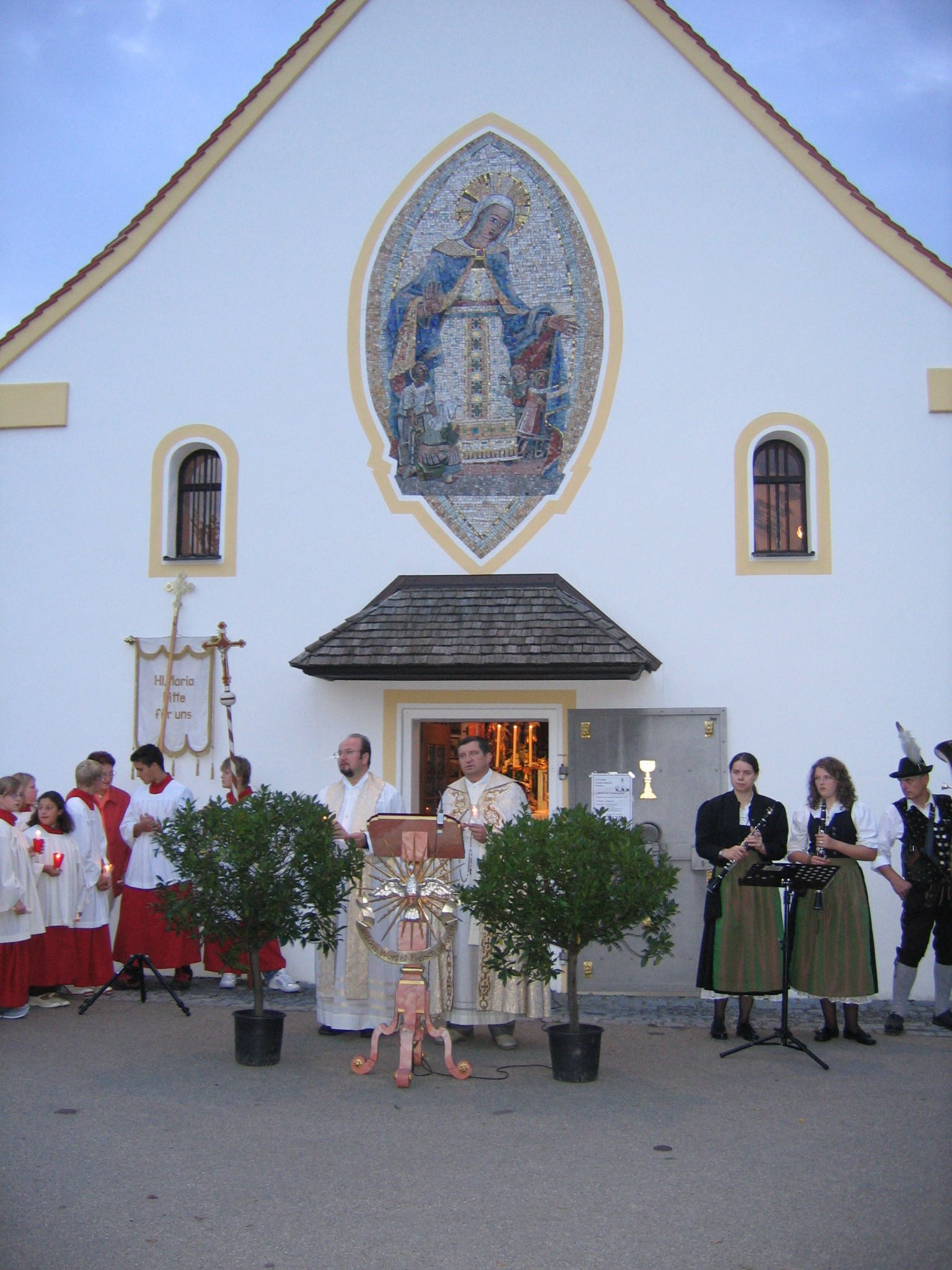 Die Scchutzmantelmadonna in Mosaik